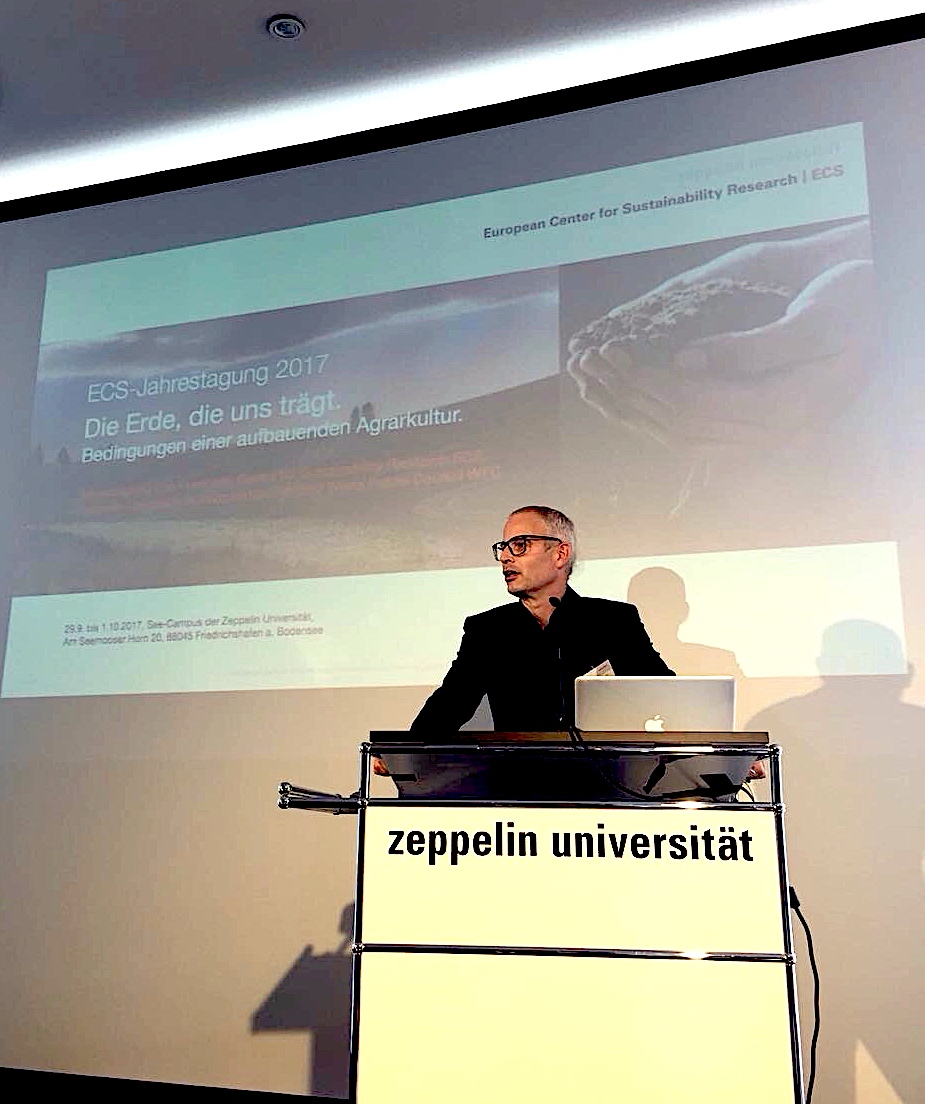 Eröffnung ECS-Jahrestagung 2017